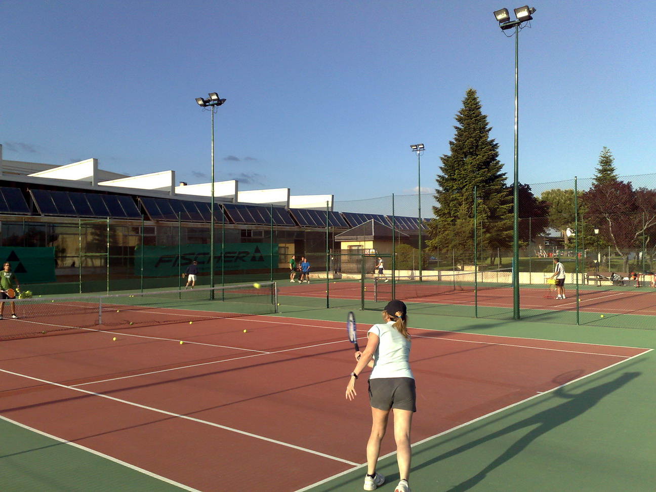 Torrelodones. Polideportivo. Pistas de Tenis y Piscina cubierta.